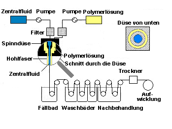 Spinnstand zur Herstellung von Hohlfasern im Nassspinnverfahren